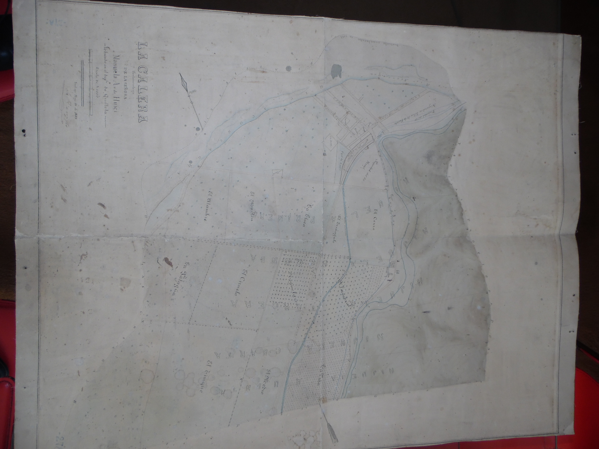 Plano Sucesión Huici, 1889